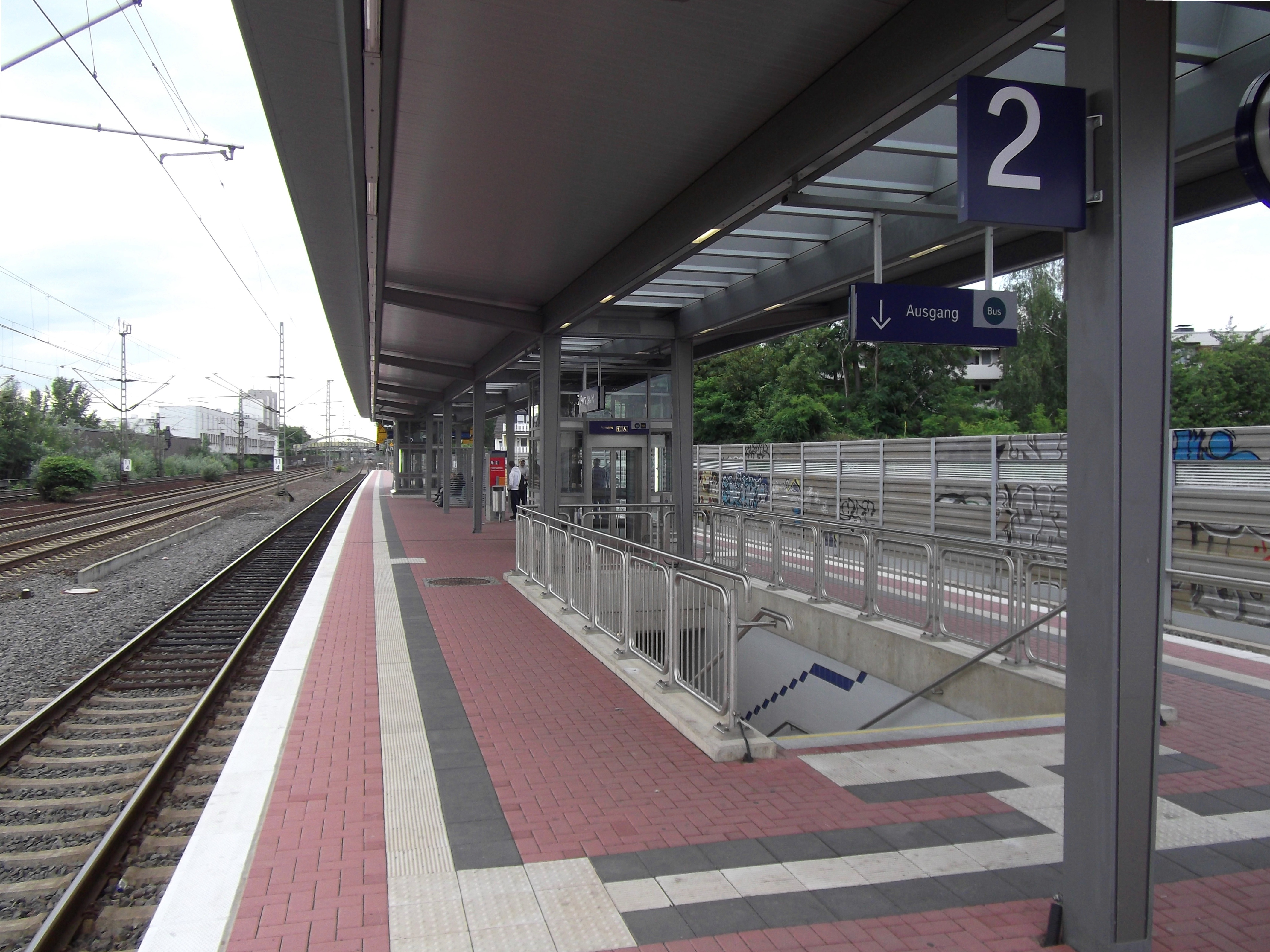 Cologne (Köln); Germany: Bahnhof Porz (Rhein)